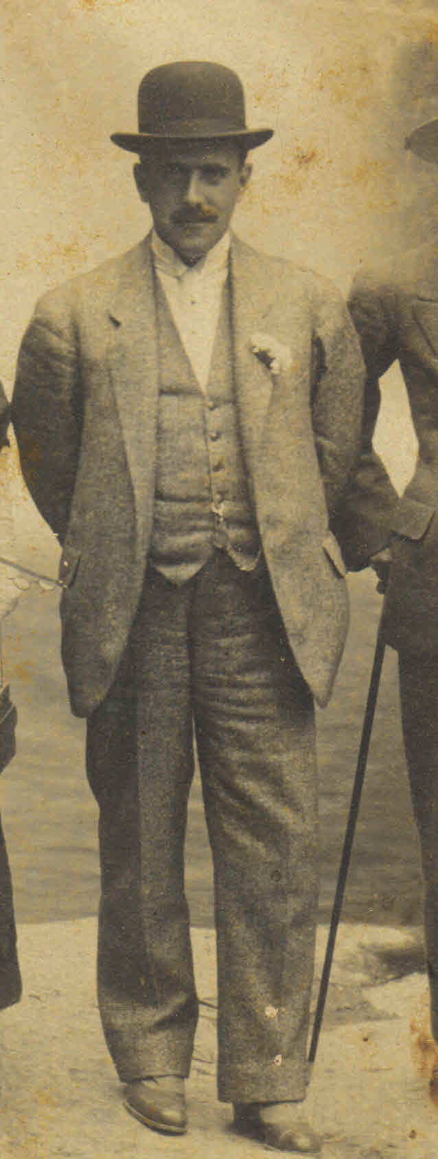 Octacílio de Carvalho Camará (Pelotas, RS, 1880 - Rio de Janeiro, RJ, 1920) Médico, advogado, deputado federal e senador brasileiro.